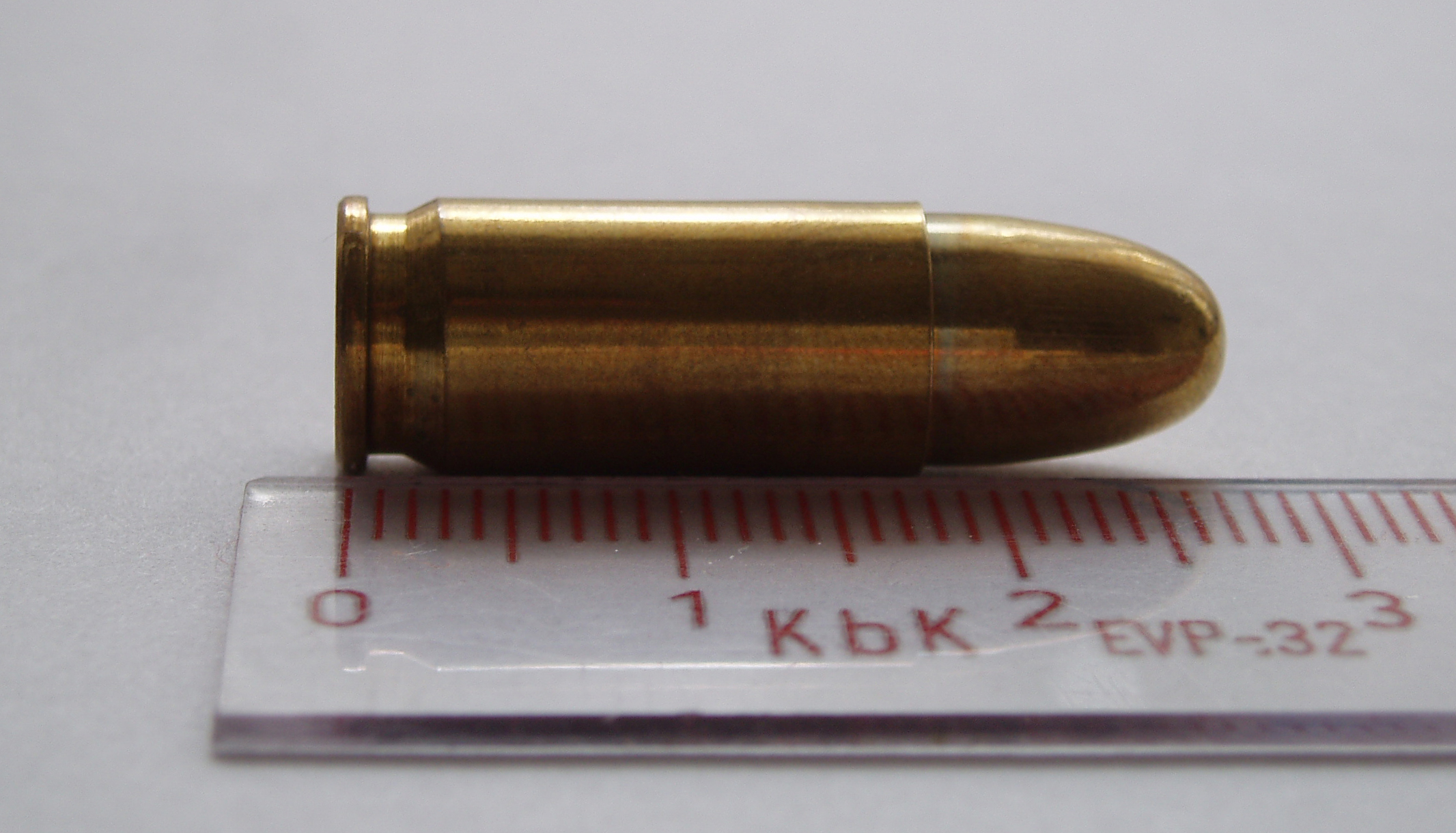 8mm Steyr cartrdige.FMJ bullet.